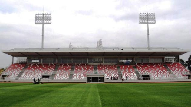 Nuevo Estadio La Granja